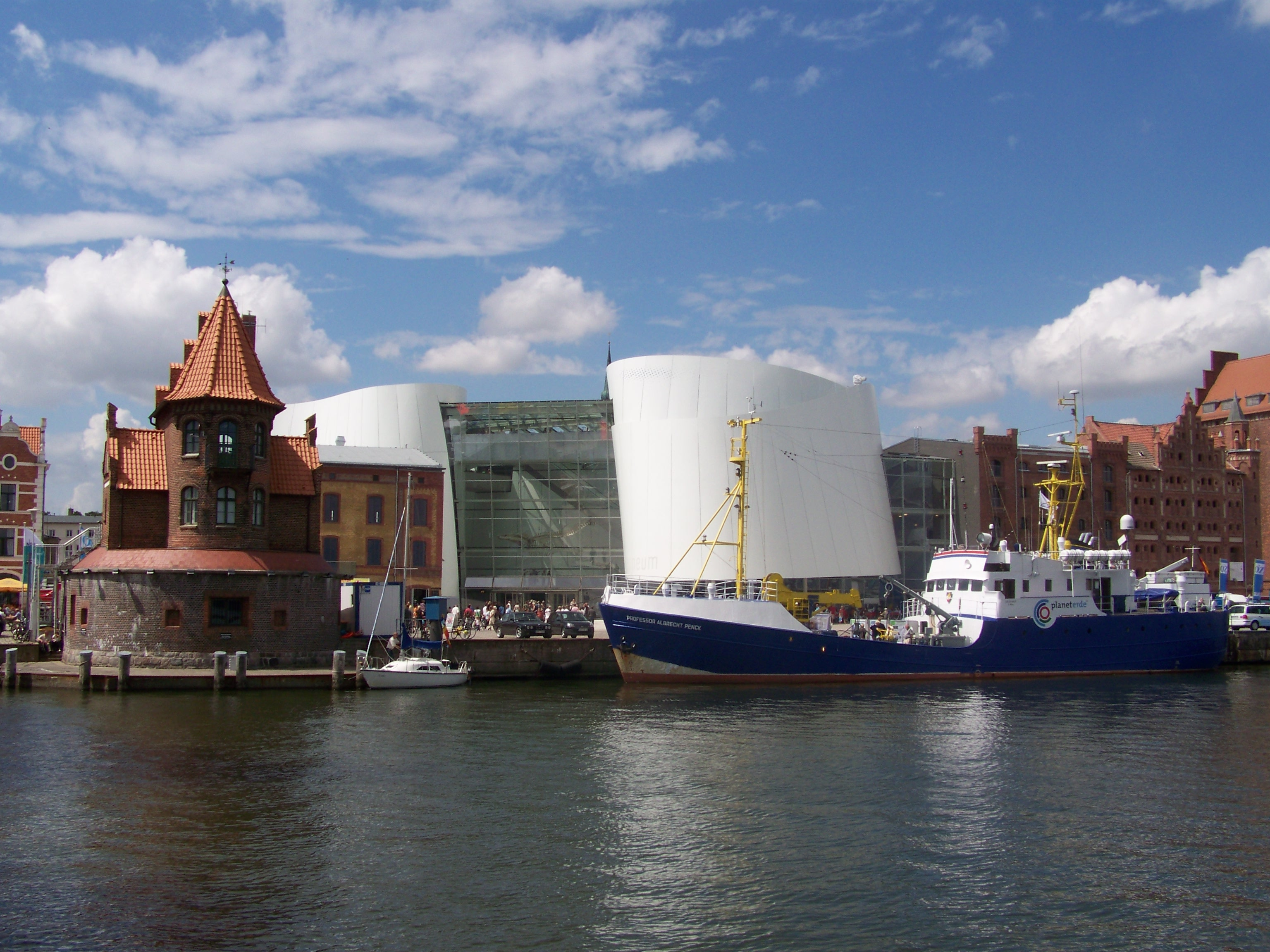 Das Ozeaneum Stralsund, Ansicht vom Hafen. Links die Lotsenwache, rechts der Türmchenspeicher. Davor am Kai liegt das Forschungsschiff „Professor Albrecht Penck“.